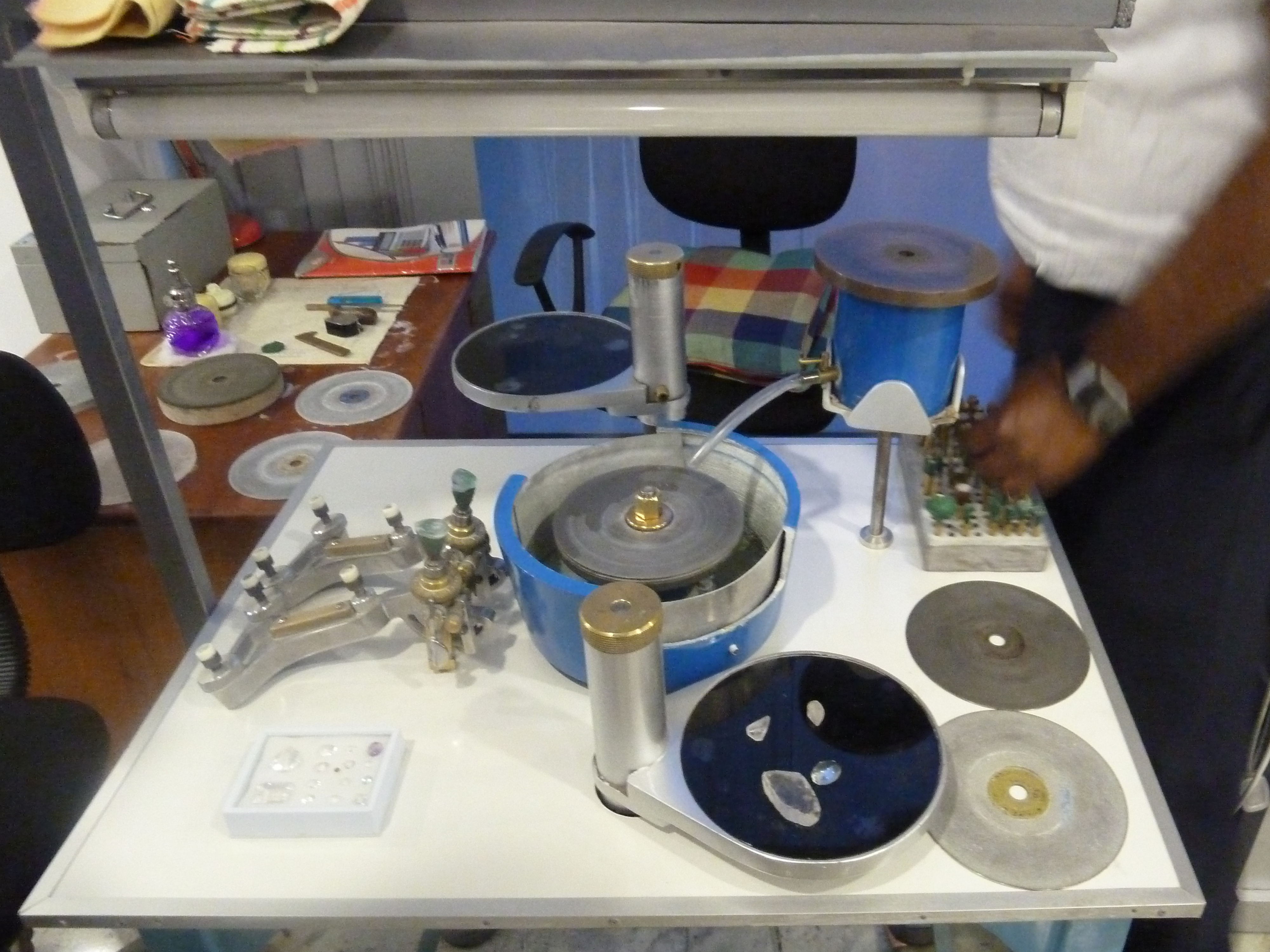 Isini Jewellerie à Kandy Sri Lanka.- Asie du Sud